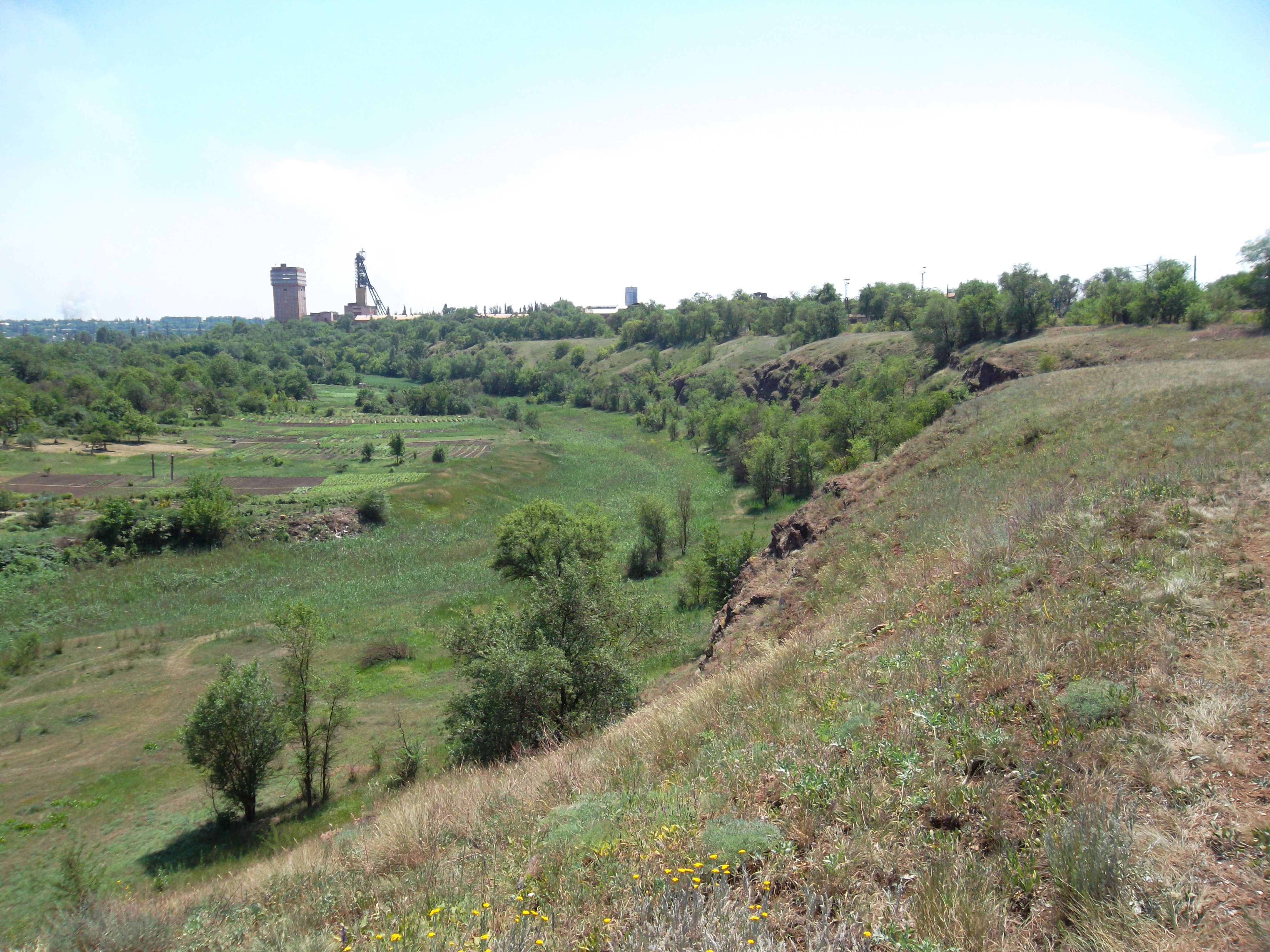 Деконська петля (стариця р. Саксагань м. Кривий Ріг)